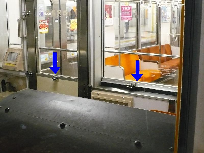 東急2000系内装